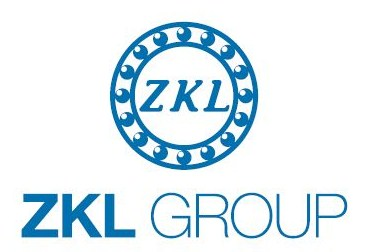 Logo české koncernové společnosti ZKL